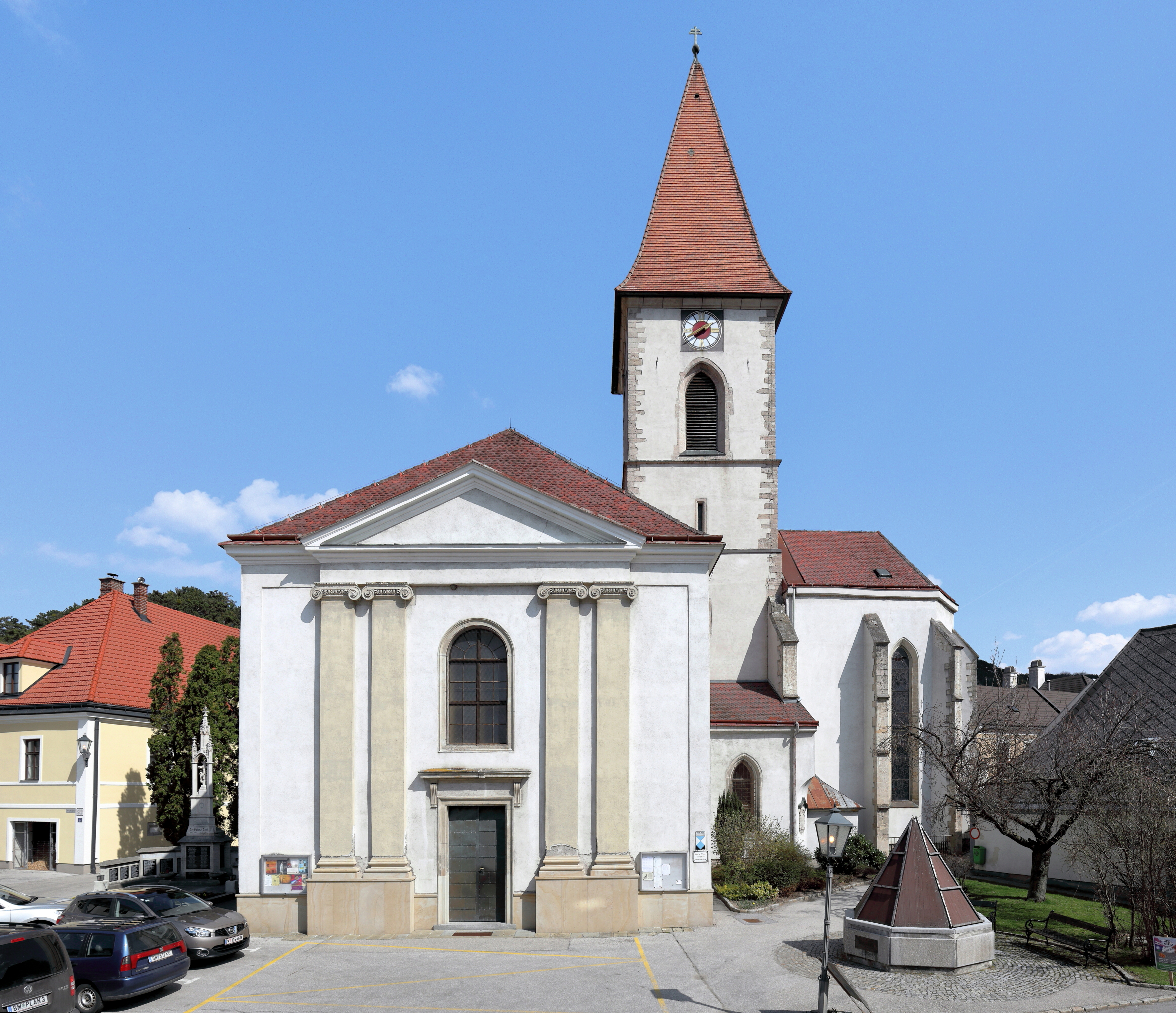 Die Pfarr- und Wallfahrtskirche Maria Trost in der niederösterreichischen Gemeinde Pottenstein.